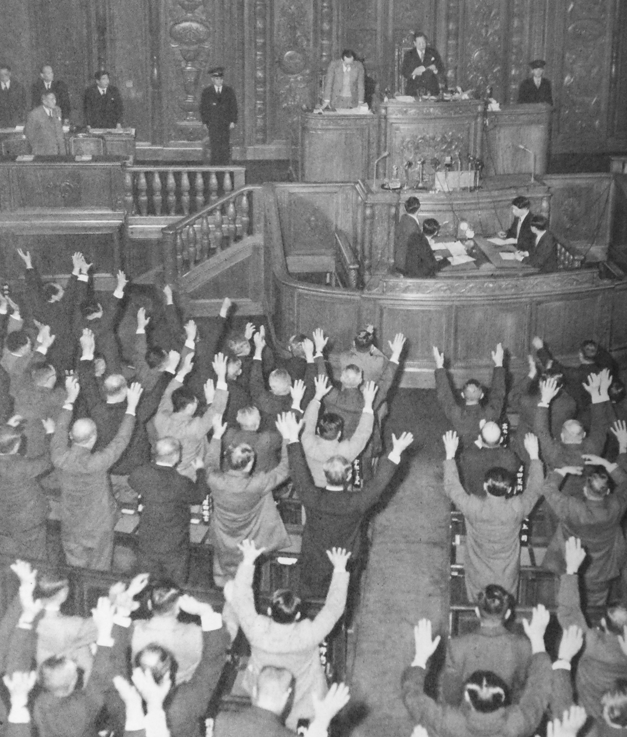 第4次吉田内閣不信任決議可決の瞬間（1953年3月14日、衆議院）